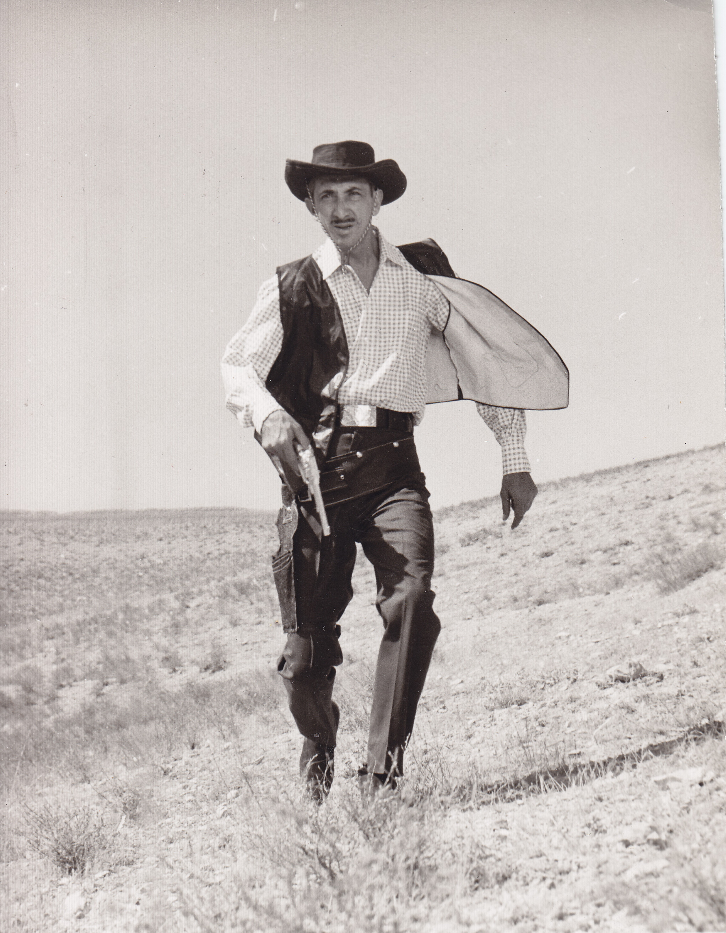 عکسی از فیلم یکه بزن